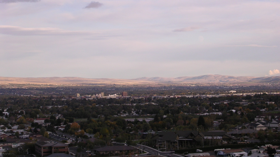 Yakima, WA, USA